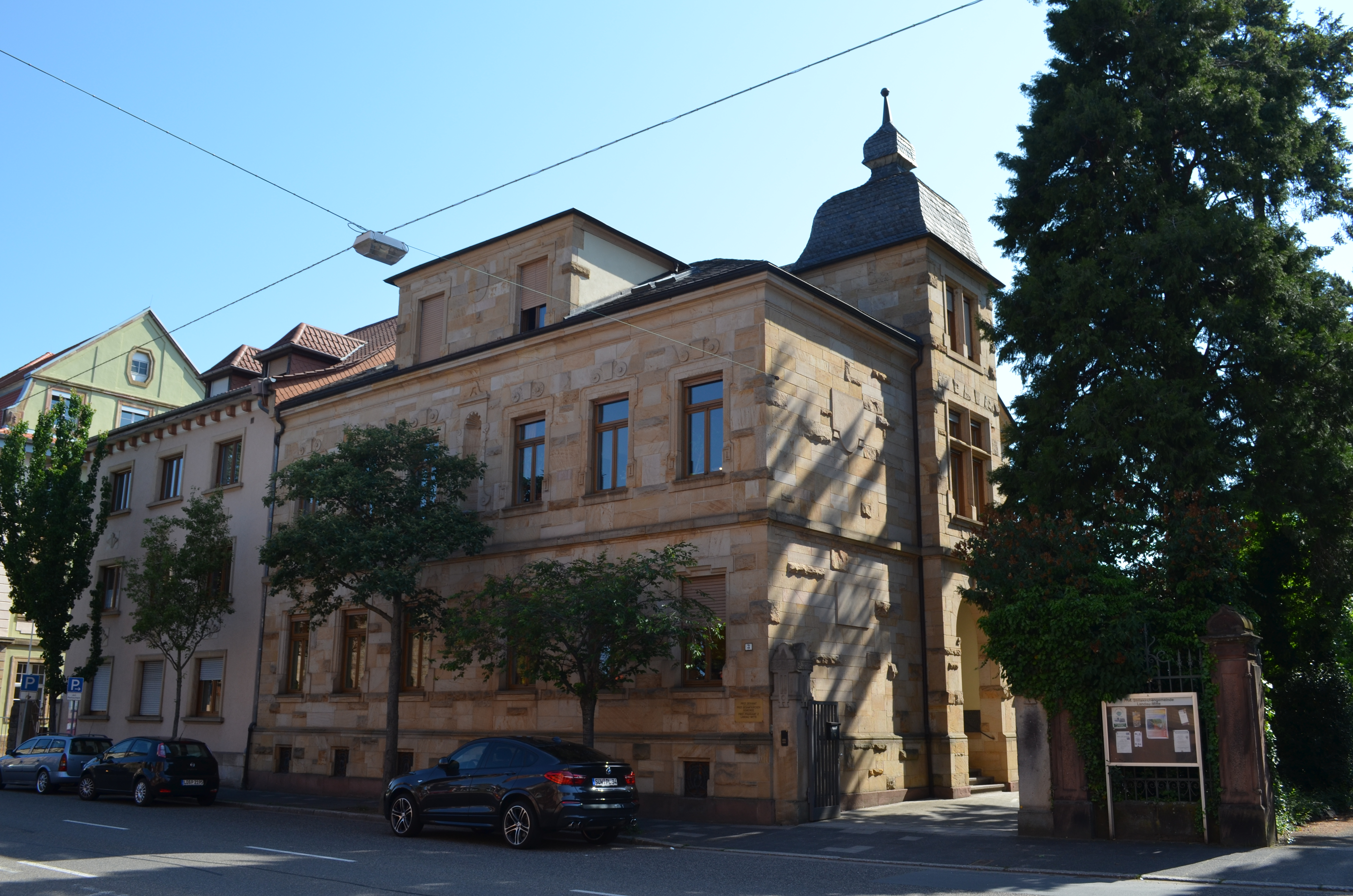 Protestantisches Dekanat in Landau, Westring 3: gründerzeitlicher Sandsteinbau, Eingangsturm, 1904